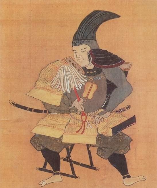 竹中重治（竹中半兵衛）。 Takenaka Shigeharu.